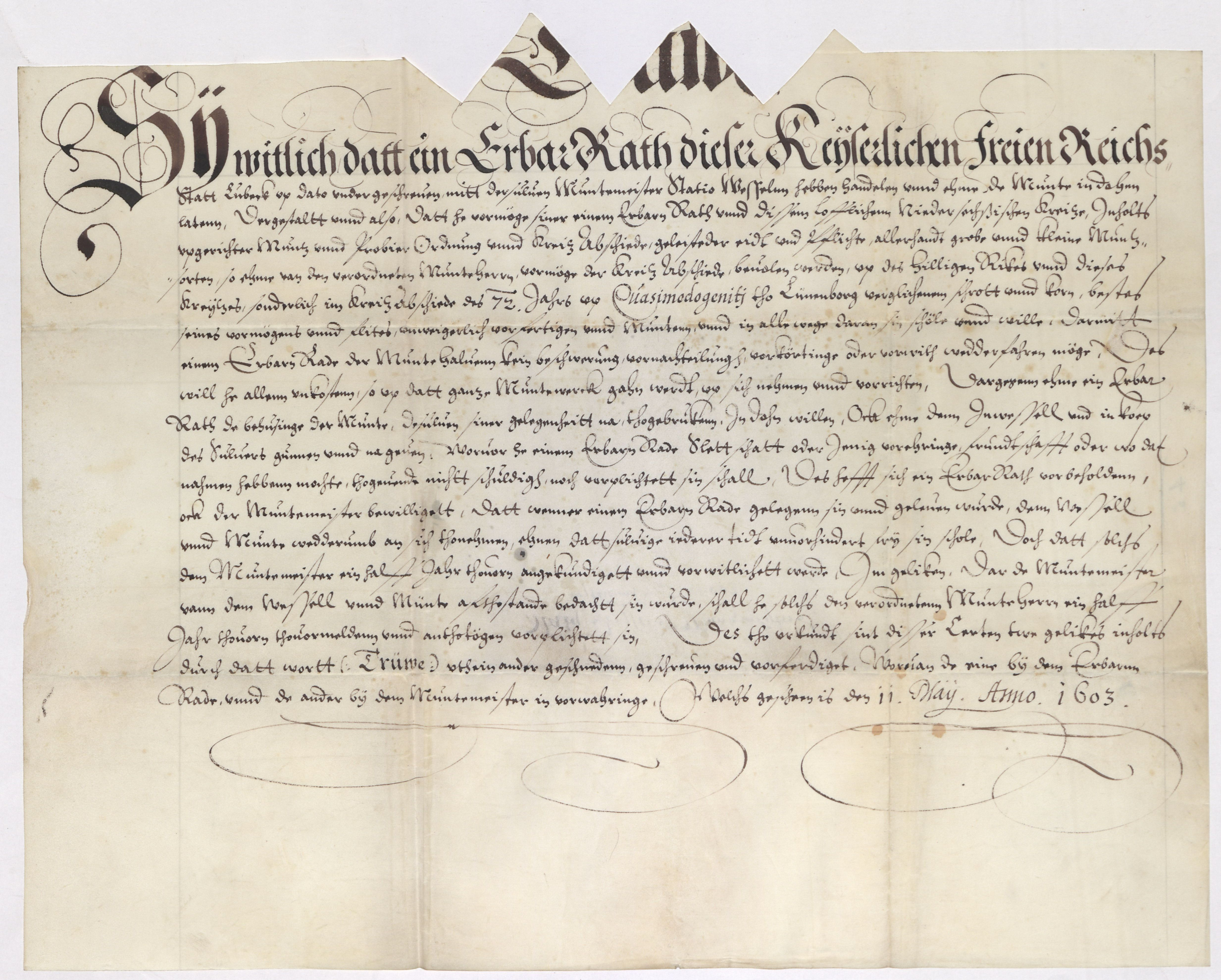 Vertrag zwischen dem Rat der Hansestadt Lübeck und dem Goldschmied Statius Wessel, mit dem dieser zum städtischen Münzmeister wird ; AHL, Sign.: 01.1-01 (5) 22839